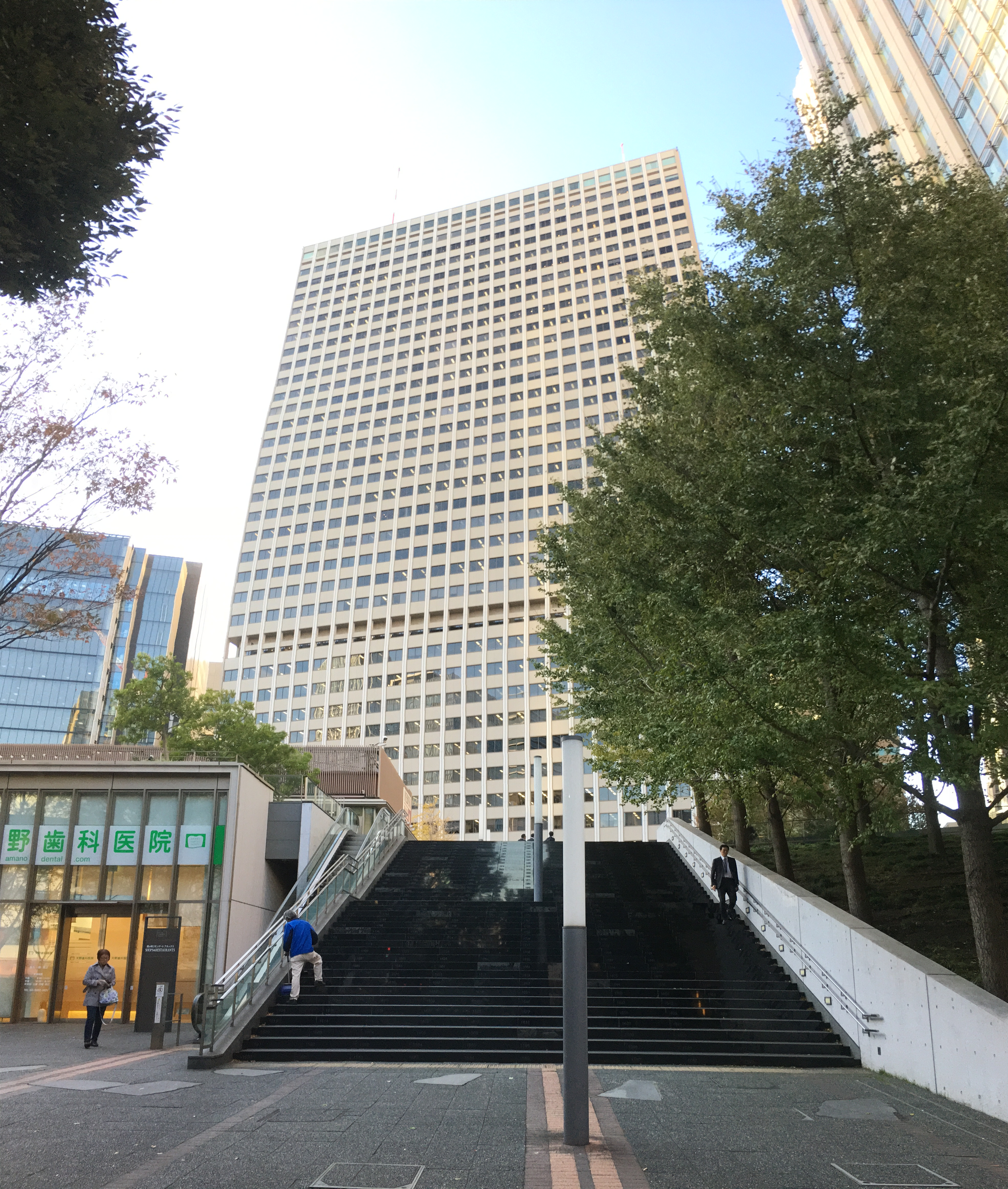 霞ヶ関ビルディング (Kasumigaseki building)